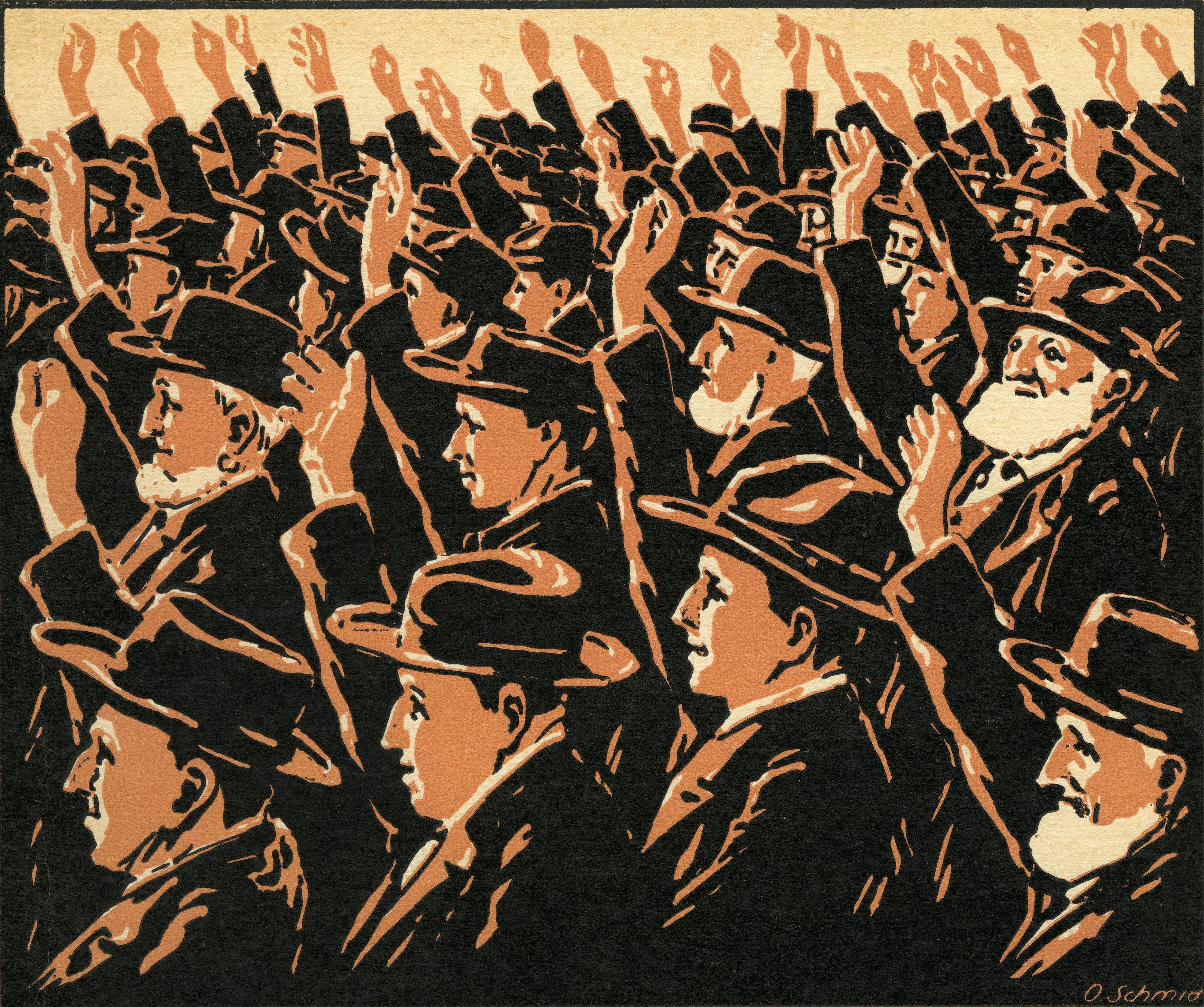 Cover der KVT-Mitteilungen Nr. 9 (Ausschnitt). Männer stimmen an der Landsgemeinde ab. Linolschnitt